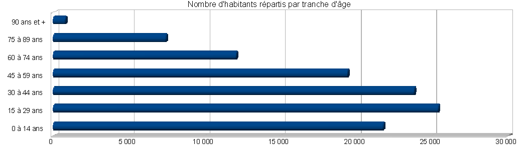 Pyramide des âges de la ville de Mulhouse réalisé à partir des données de l'INSEE libres de droi